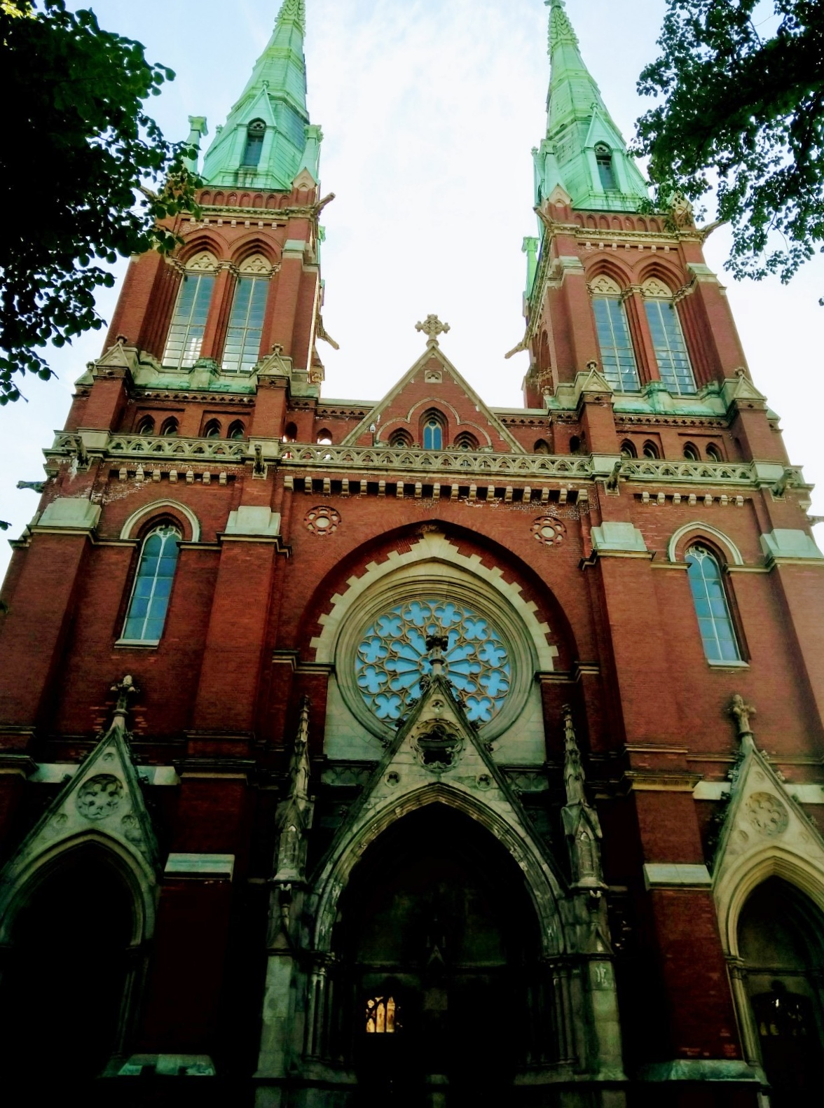 Johanneksenkirkko